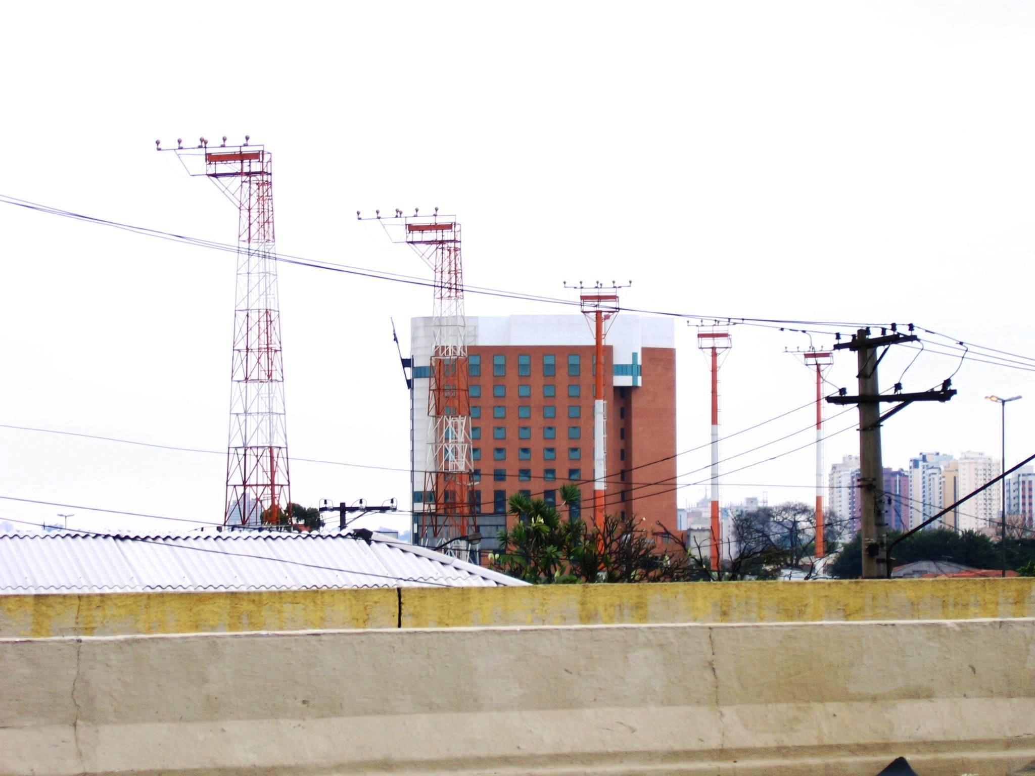 Prédio que interfere na aproximação das aeronaves que pousam no Aeroporto de Congonhas pelo lado do bairro de Moema